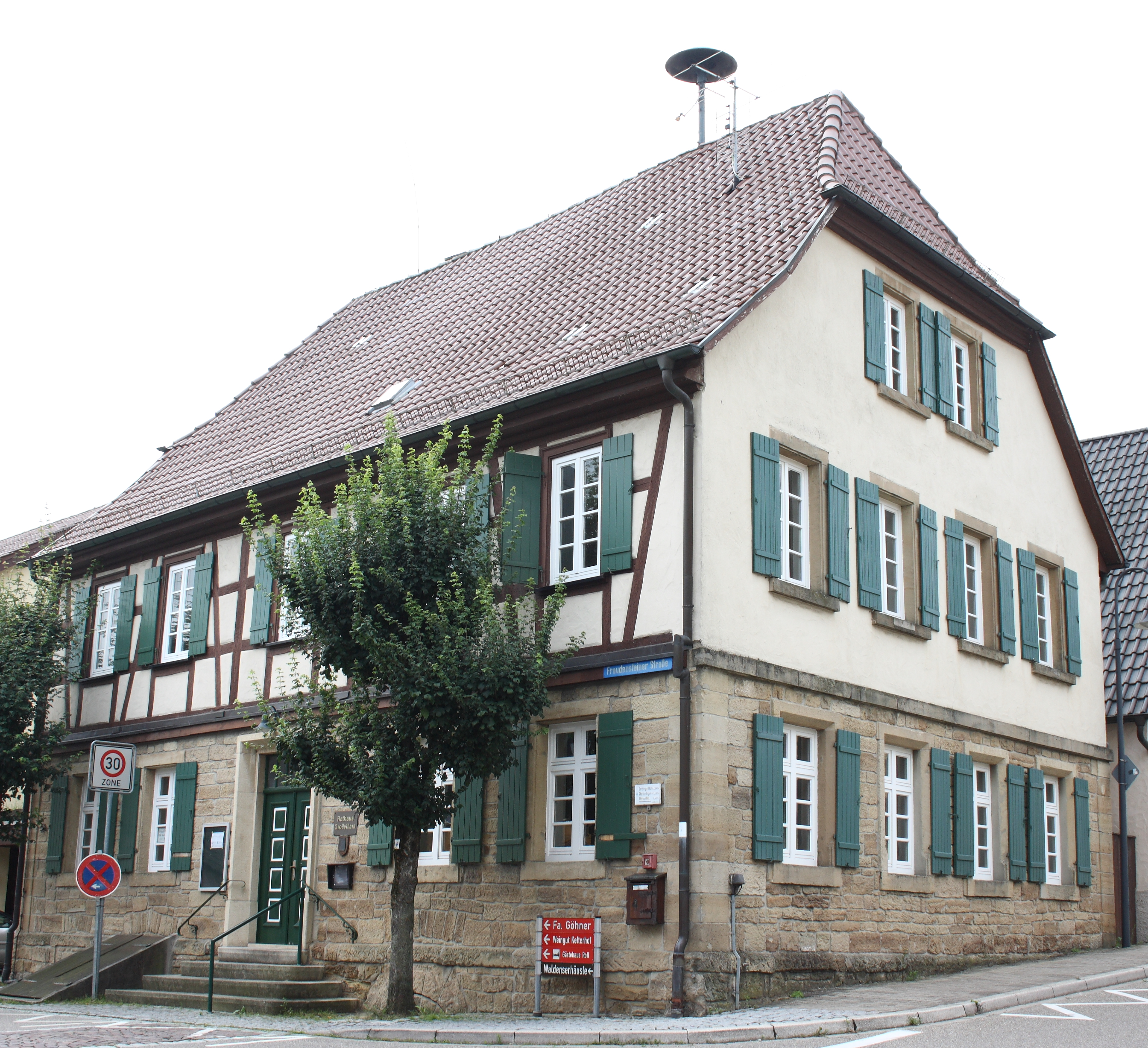 ehemaliges Schul- und Rathaus in Großvillars, Freudensteiner Straße 2, Ecke Heilbronner Straße